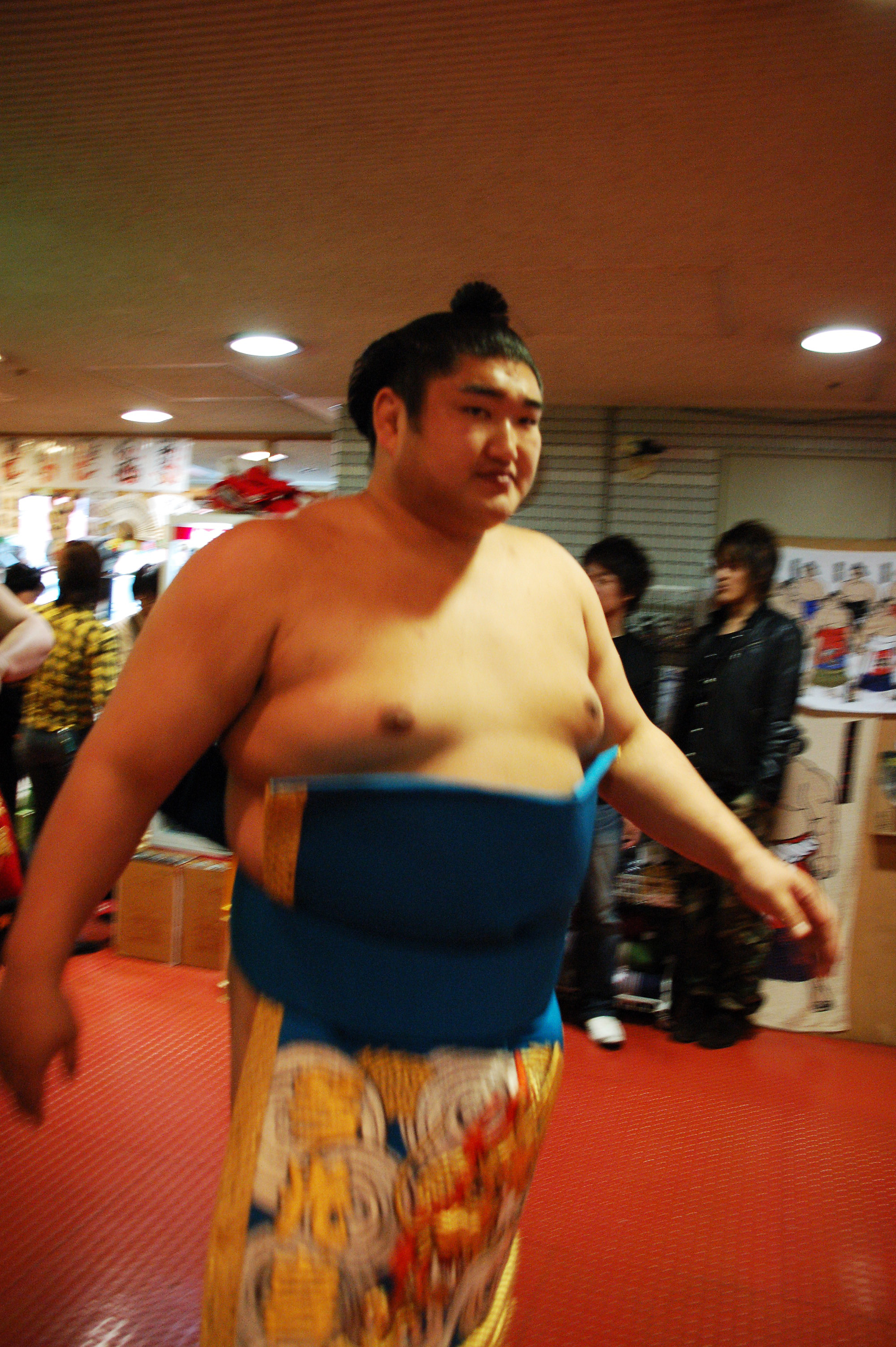 2006.03.20 15:52, Osaka Namba (難波・大阪府立体育館)